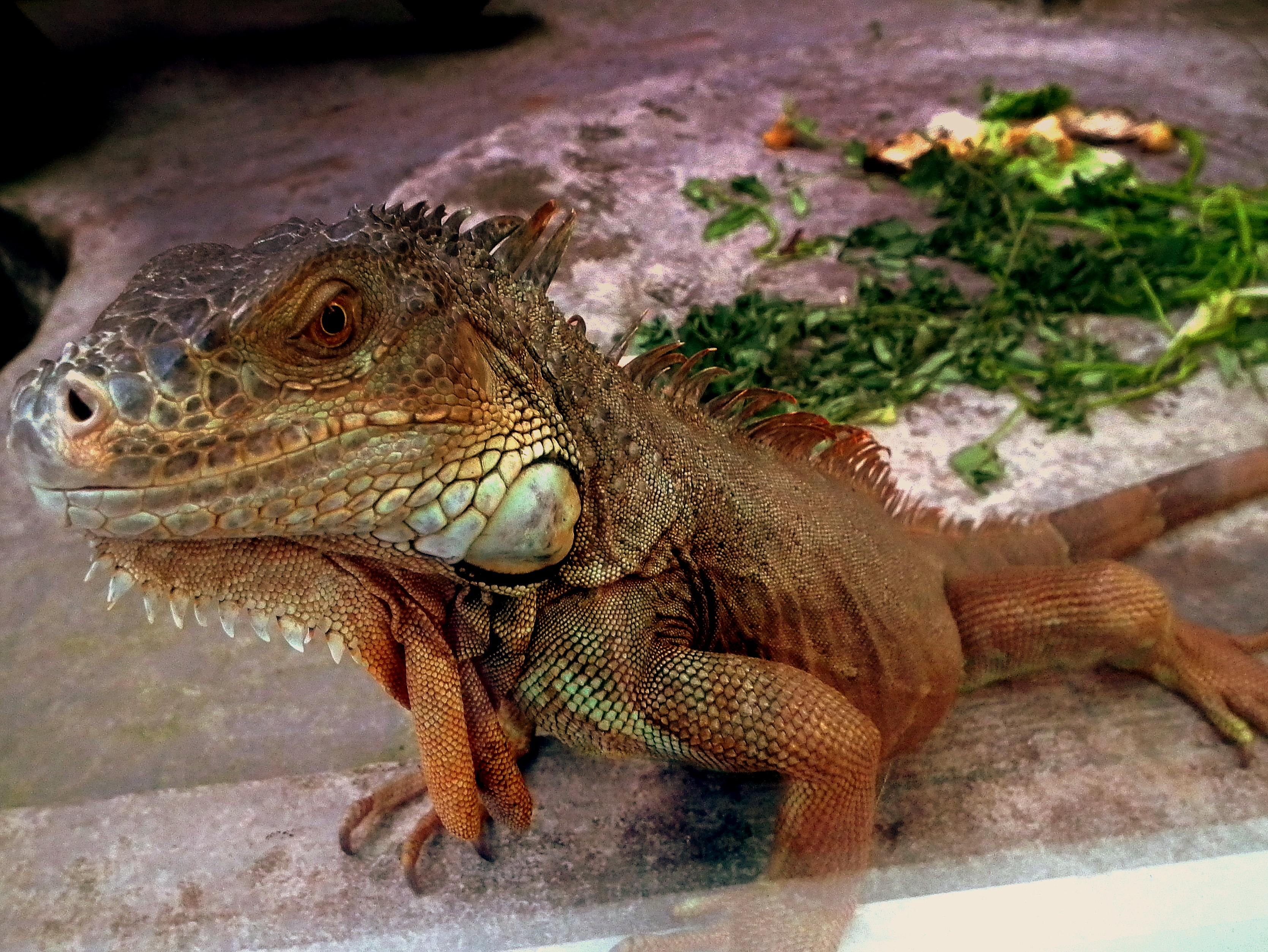 SAIGON ZOO VIETNAM JAN 2012